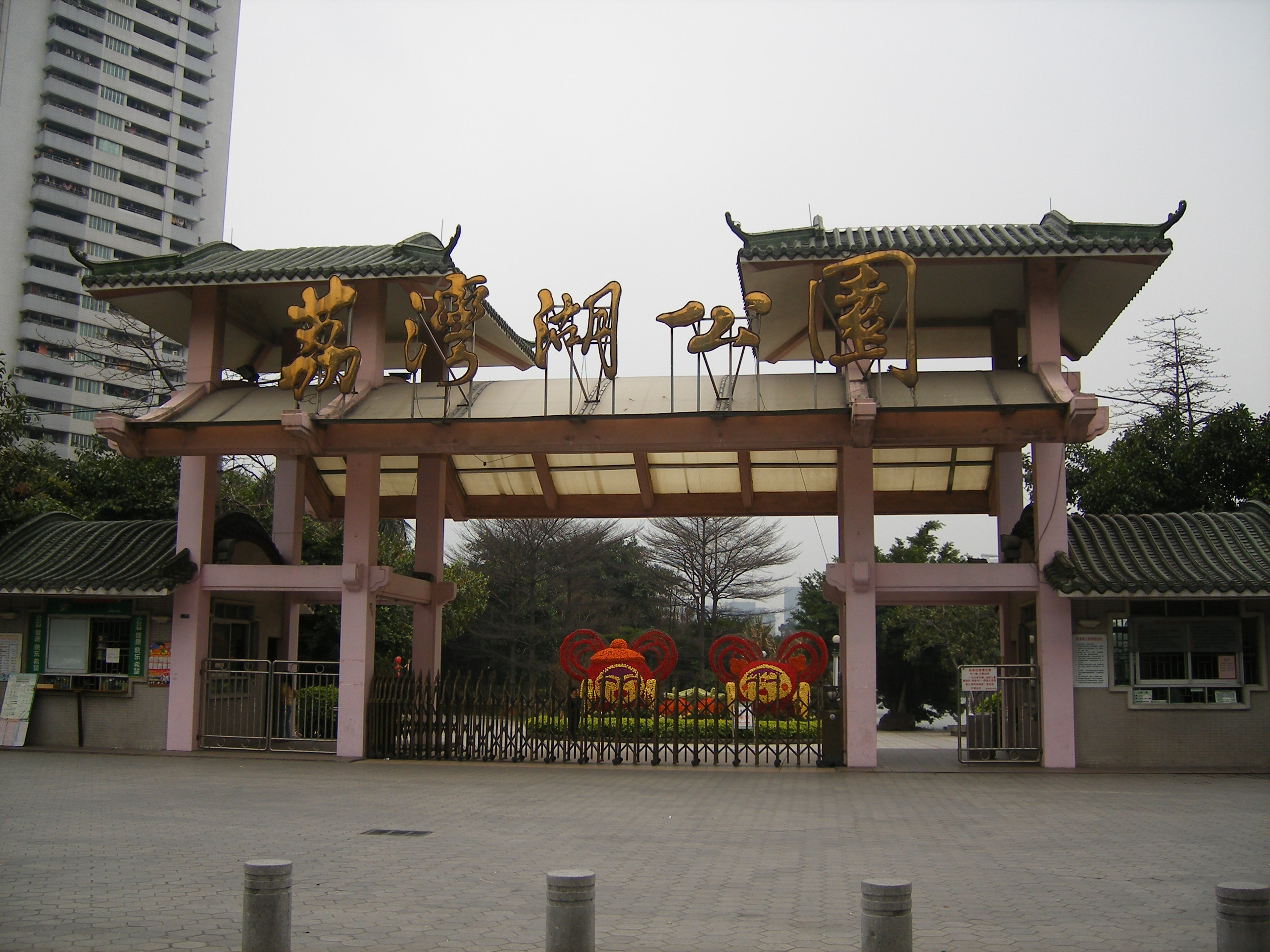 廣州市荔灣湖公園北門。